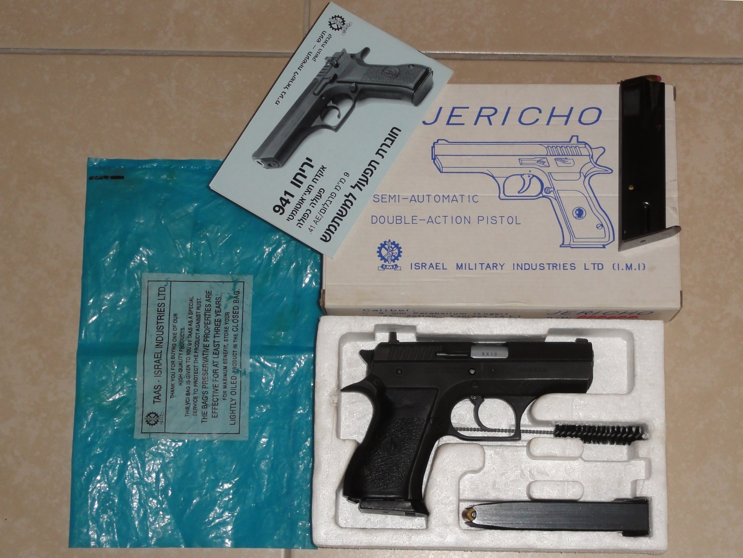 אקדח יריחו 941FB במארז מקורי בו שווק ע"י תע"ש עם חוברת הוראות הפעלה ושתי מחסניות נוספות